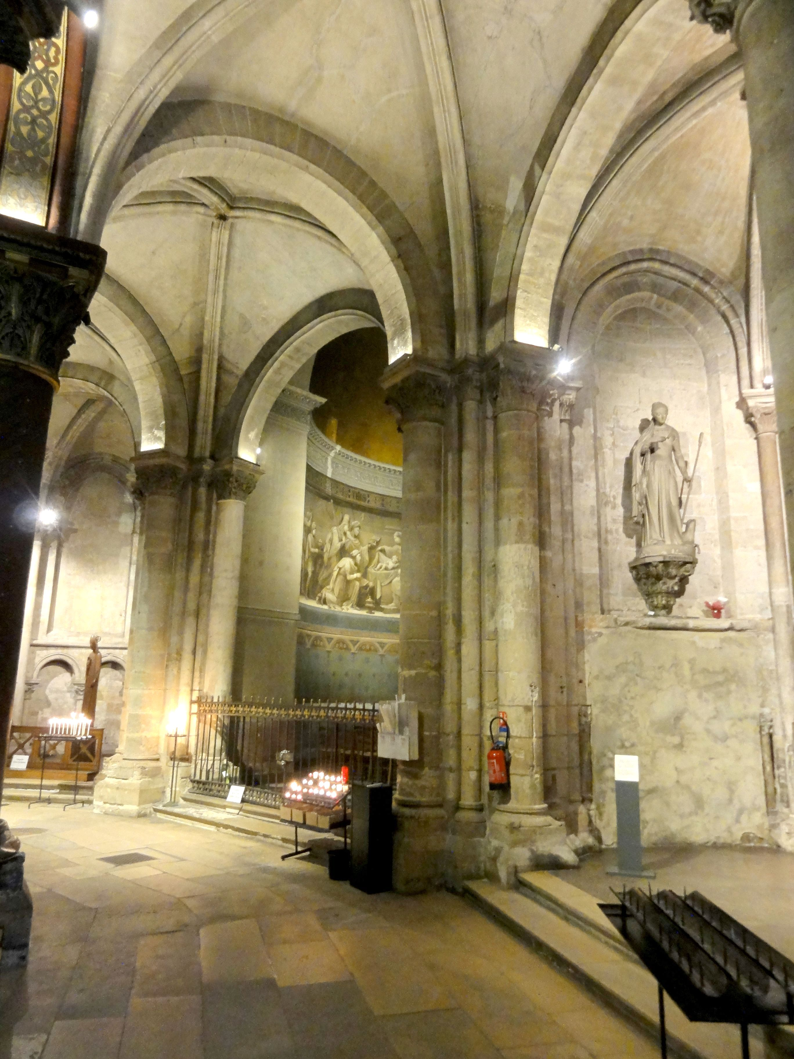 Déambulatoire sud, vue vers l'est.